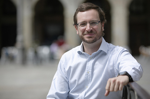 Javier Maroto Aranzábal, portavoz del PP en el Ayuntamiento de Vitoria-Gasteiz